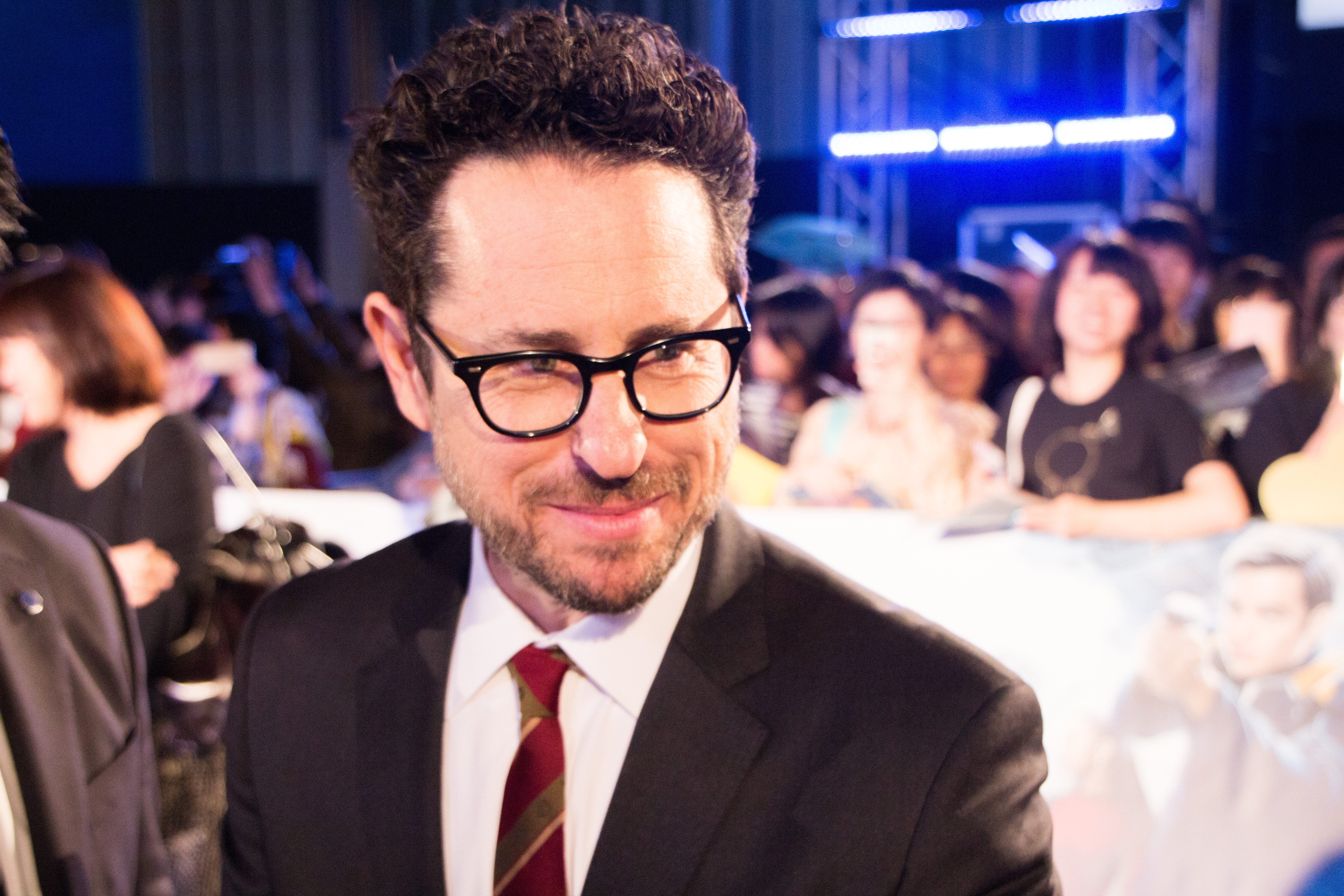 スター・トレック BEYOND ジャパン・プレミア レッドカーペット J・J・エイブラムス